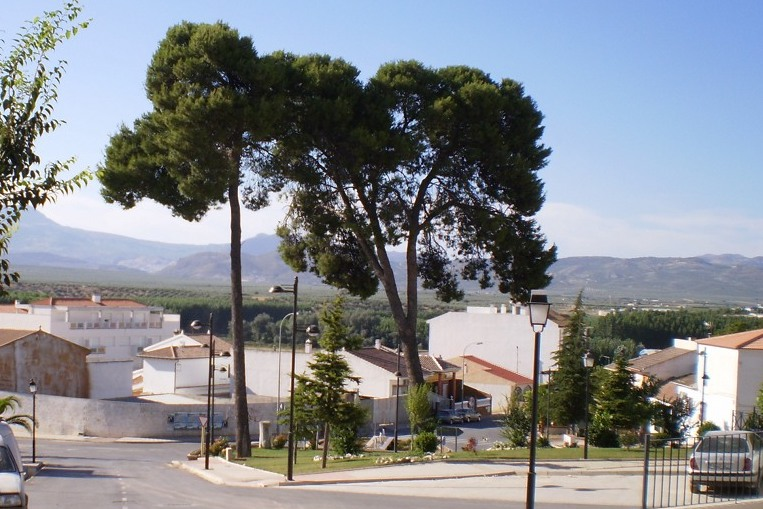 Gran Vía de Colón, en la localidad de Láchar (Granada, España)